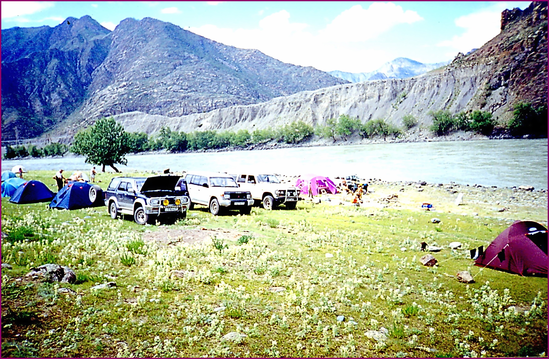 Организация полевого лагеря на берегу р. Катунь российско-американской экспедиции для изучения дилювия Центрального Алтая.